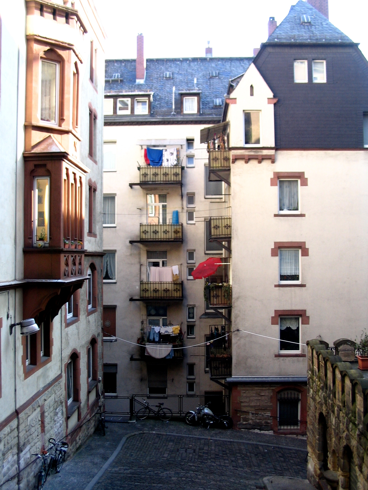 Die Siedlung Baentschstraße in Mainz, Innenansicht.